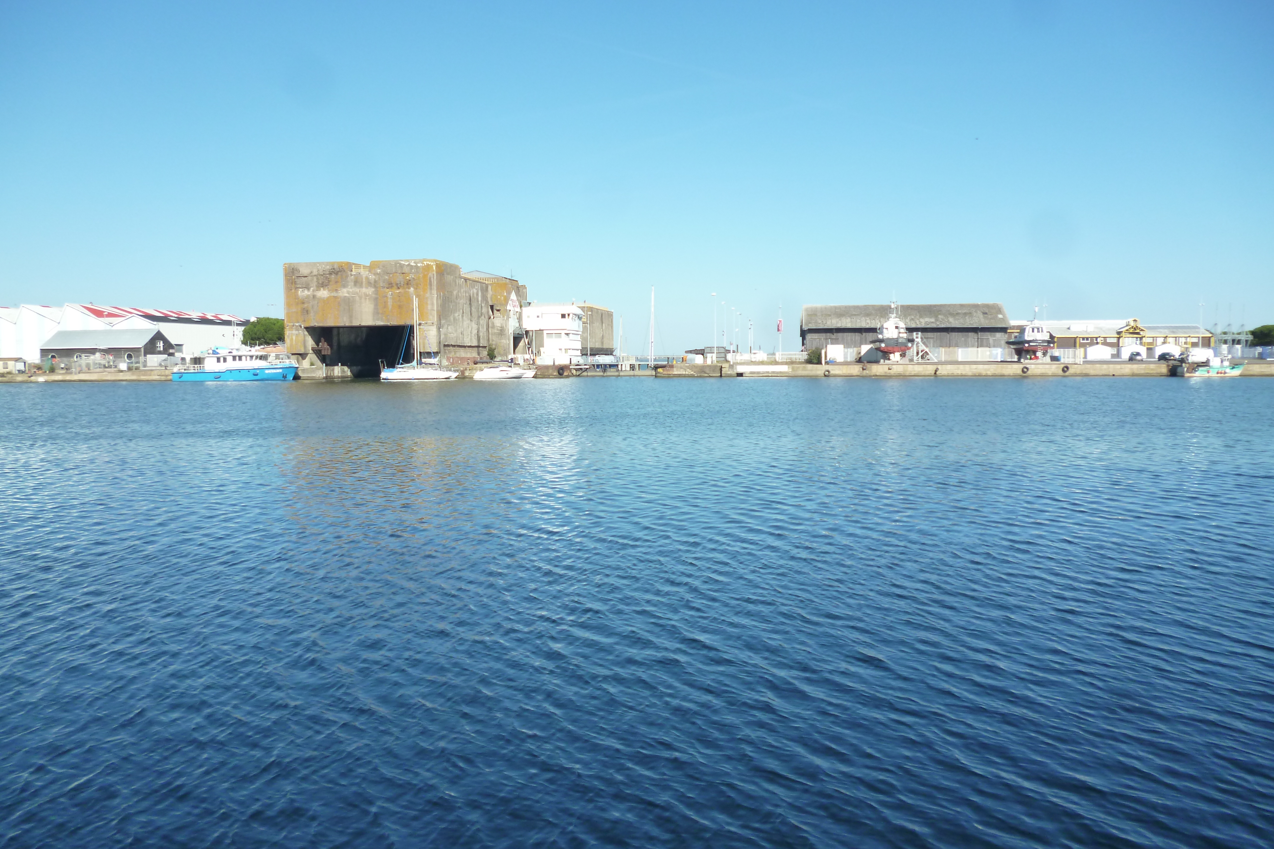 Ville de Saint-Nazaire (Loire-Atlantique).